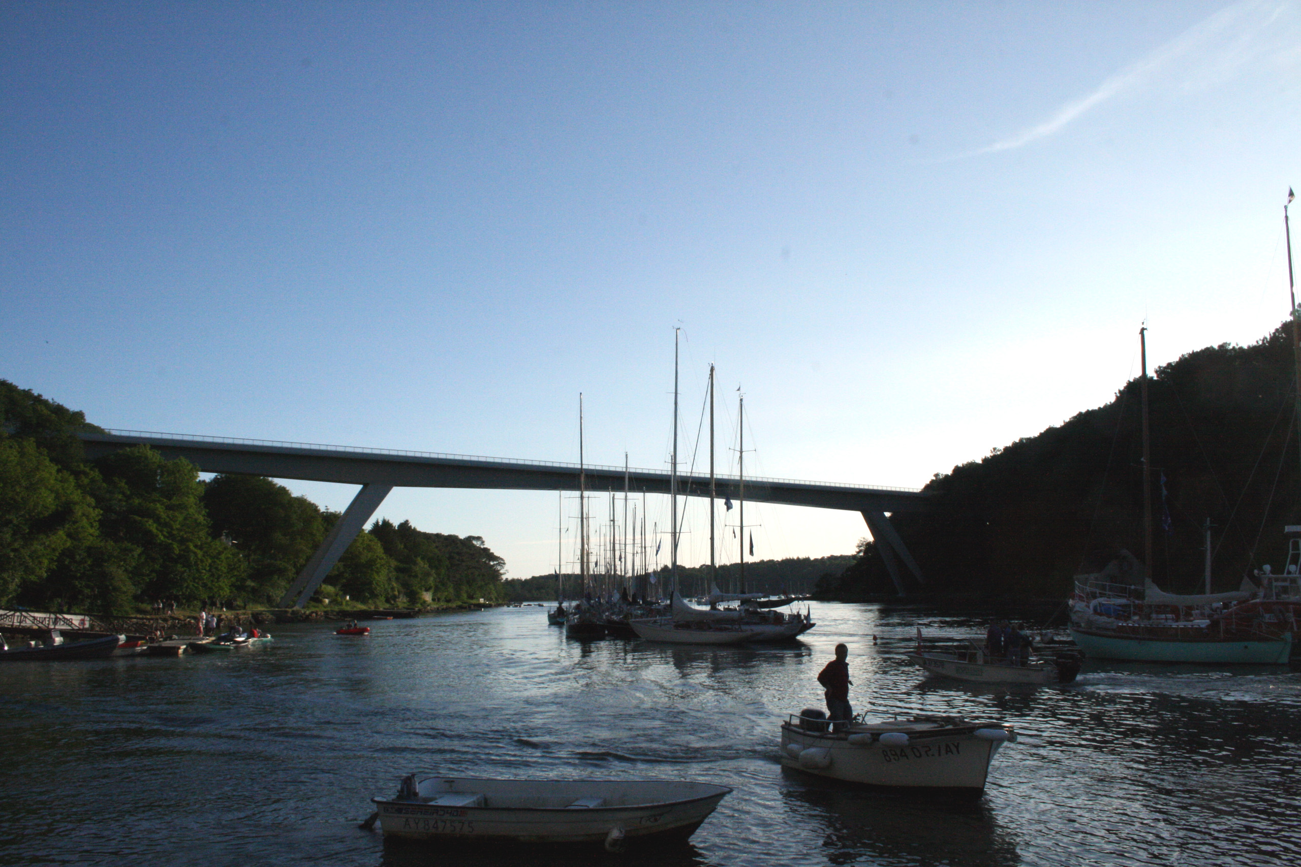 Pont Joseph Le Brix au Bono.